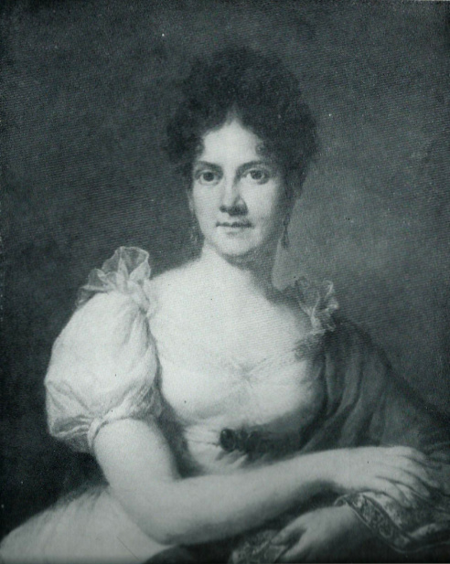 Anna z Krajewskich Nakwaska